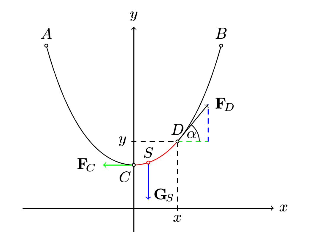 A láncgörbe levezetéséhez használatos ábra. Készült LaTeX-ben, TikZ csomaggal, png-vé konvertálva